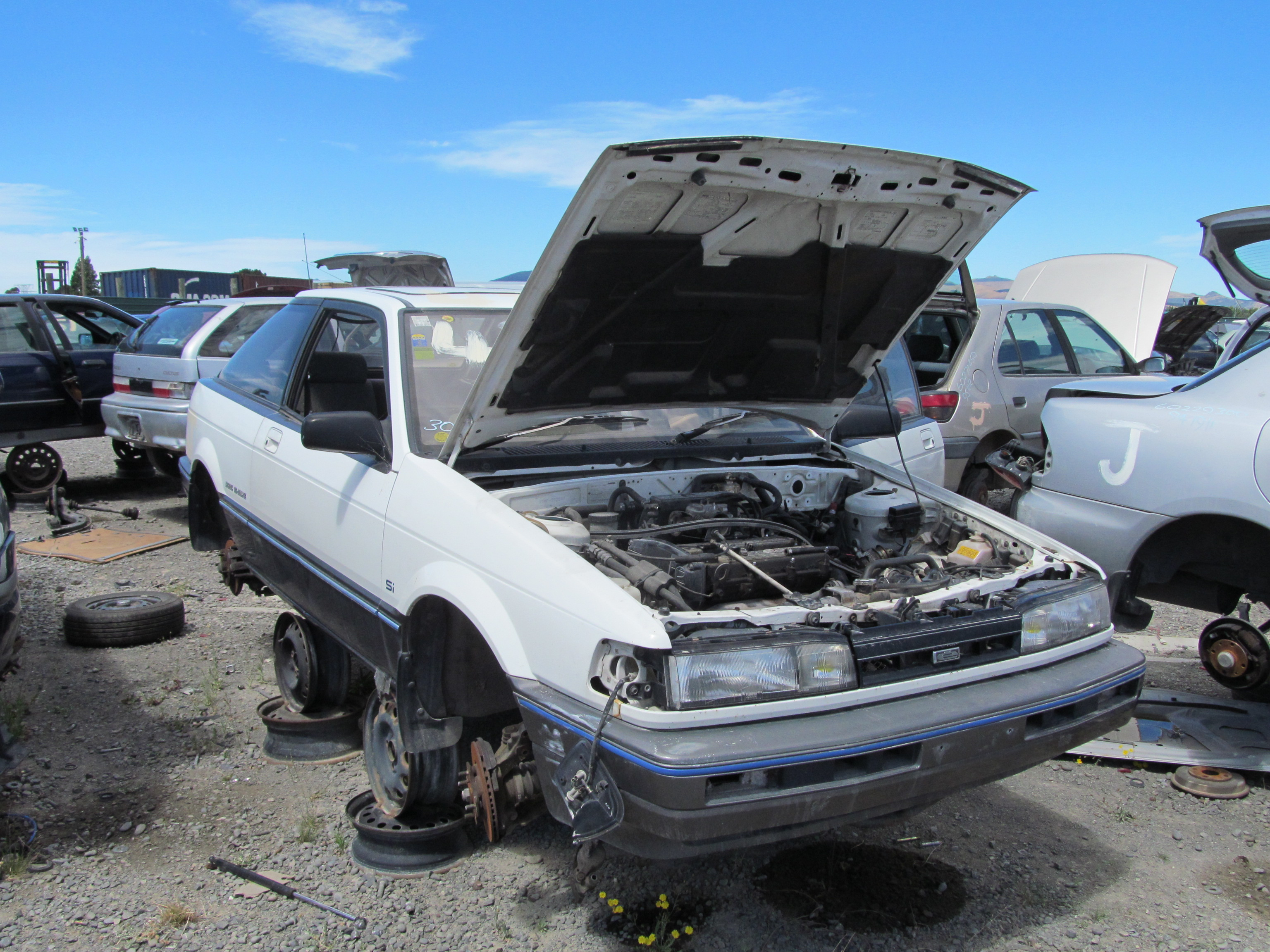 Mazda Etude